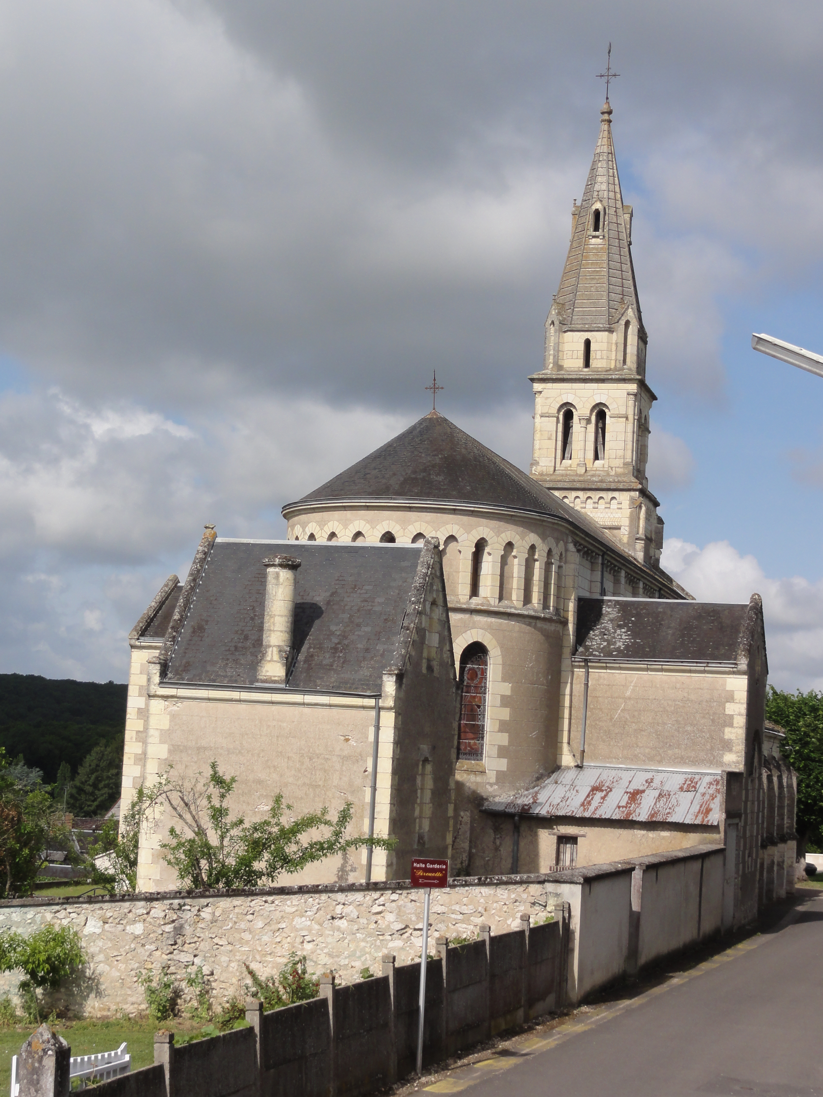 Candé-sur-Beuvron (Loir-et-Cher) Église (2)